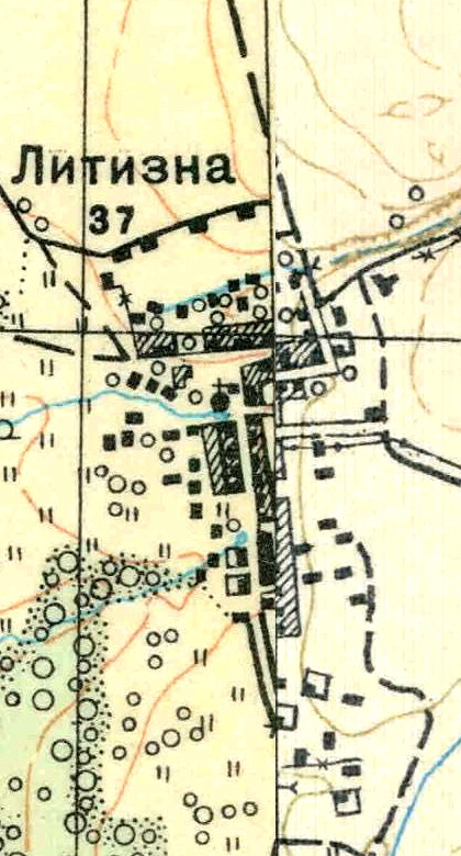 Топографическая карта Ленинградской области, квадрат О-35-22-Г-а (Керстово), деревня Литизно.